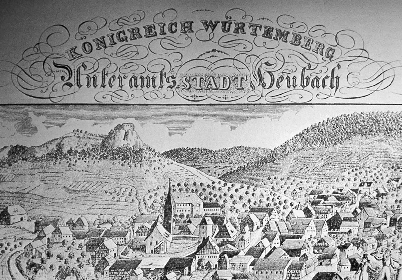 Heubach um 1830 - Public Domain